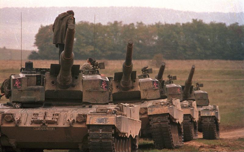 23.9.1986 Mitarbeiter des Bundespresseamtes beobachten das Herbstmanöver "Fränkischer Schild" der Bundeswehr- mit Beteiligung zahlreicher Soldaten aus NATO-Mitgliedsstaaten sowie eines französichen Großverbandes - im Raum Würzburg.